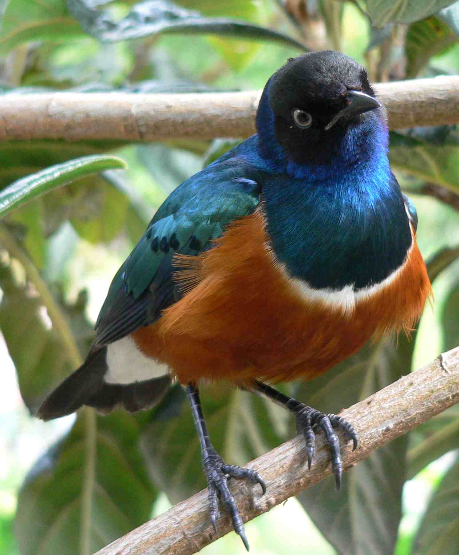 Dreifarben-Glanzstar